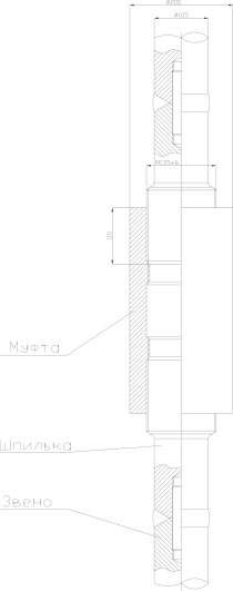 Эскиз анкерной тяги